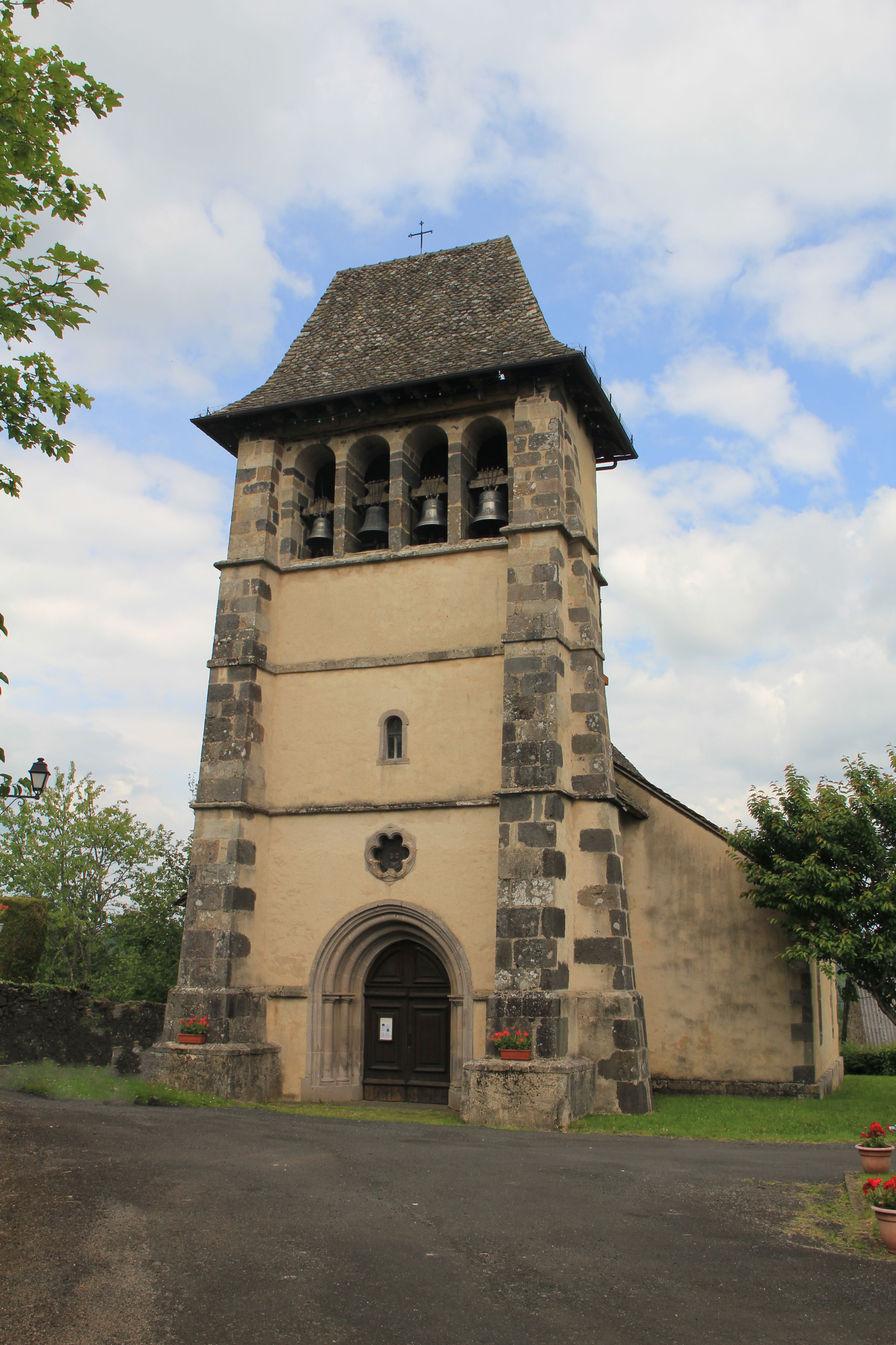 Église Saint-Martin